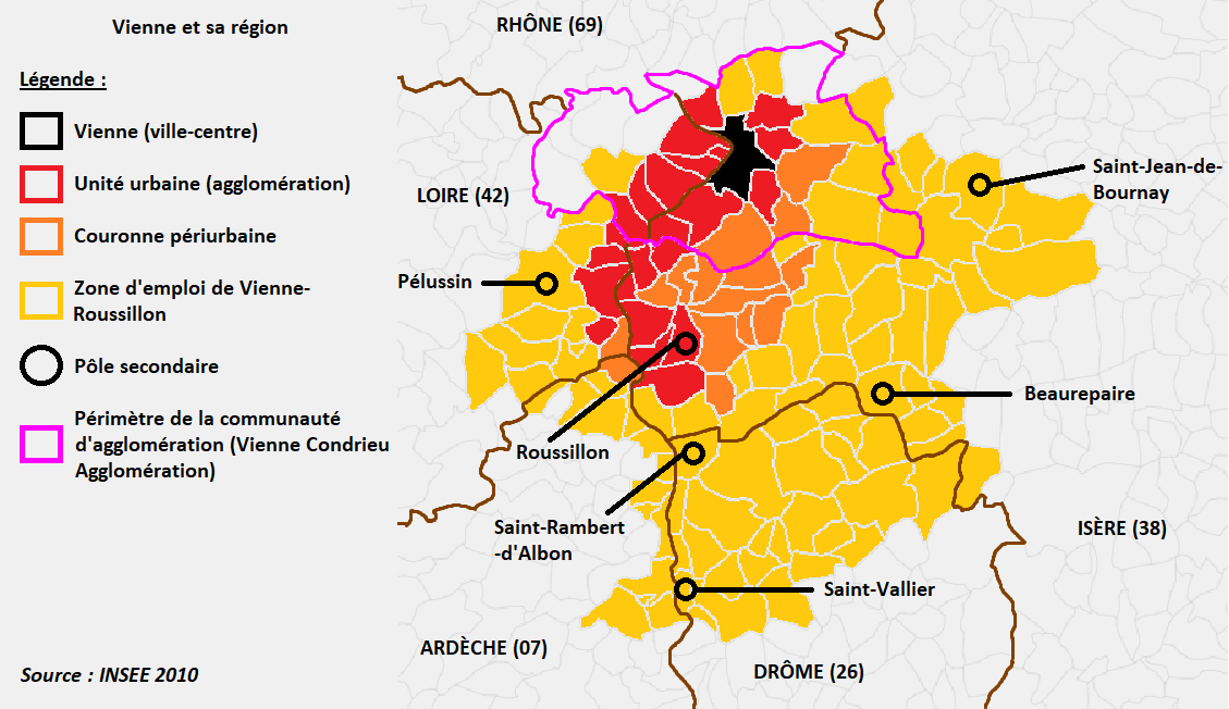 Zone d'emploi (jaune), couronne périurbaine (orange) et agglomération (rouge) de Vienne, avec le périmètre (violet) de Vienne Condrieu Agglomération en 2020